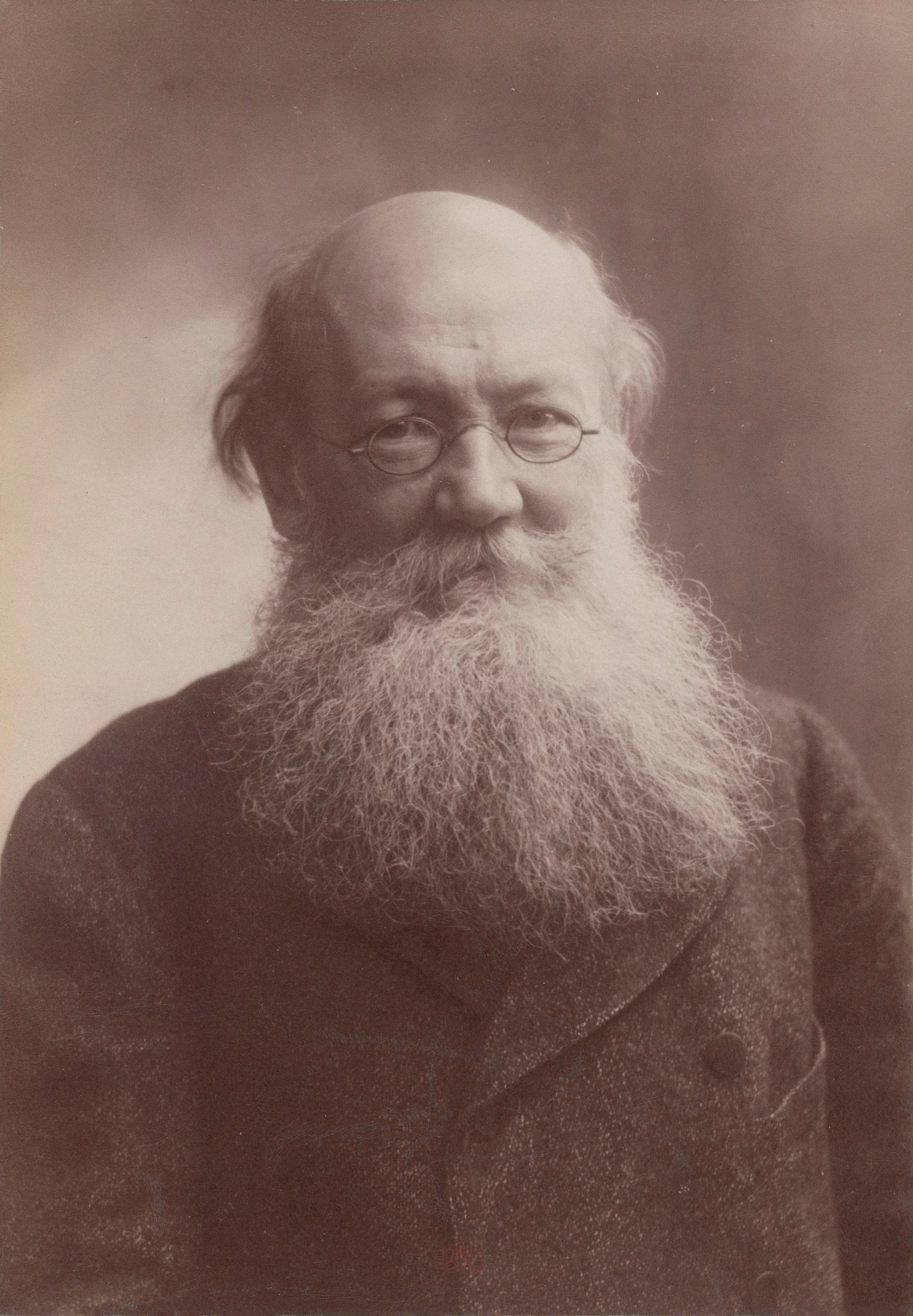 Peter Kropotkin circa 1900